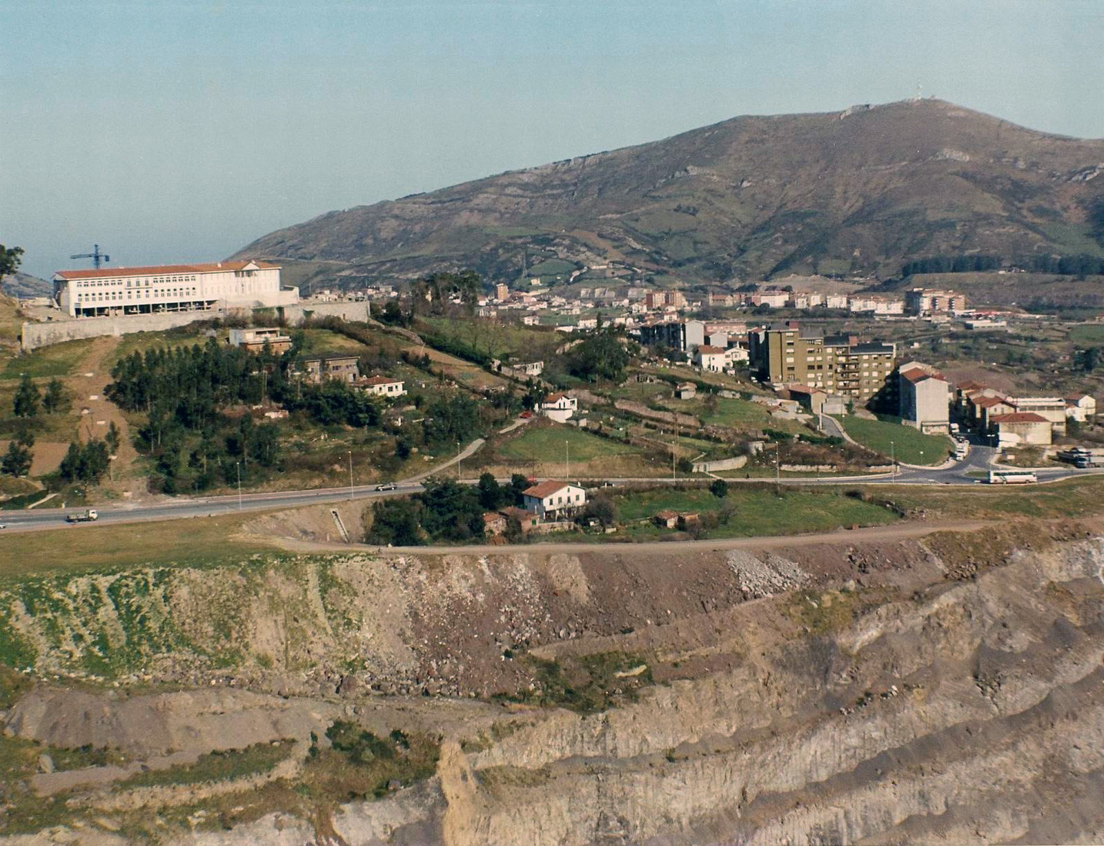 "Kontxa II" izeneko meatza eta Gallartako goialdea, atzean Serantes mendia.